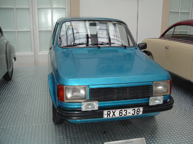 Trabant P1100 Prototyp Dieses Bild habe ich selber gemacht. Der Wagen wurde zu diesem Zeitpunkt im Verkehrsmuseum in Dresden ausgestellt. TobmansX